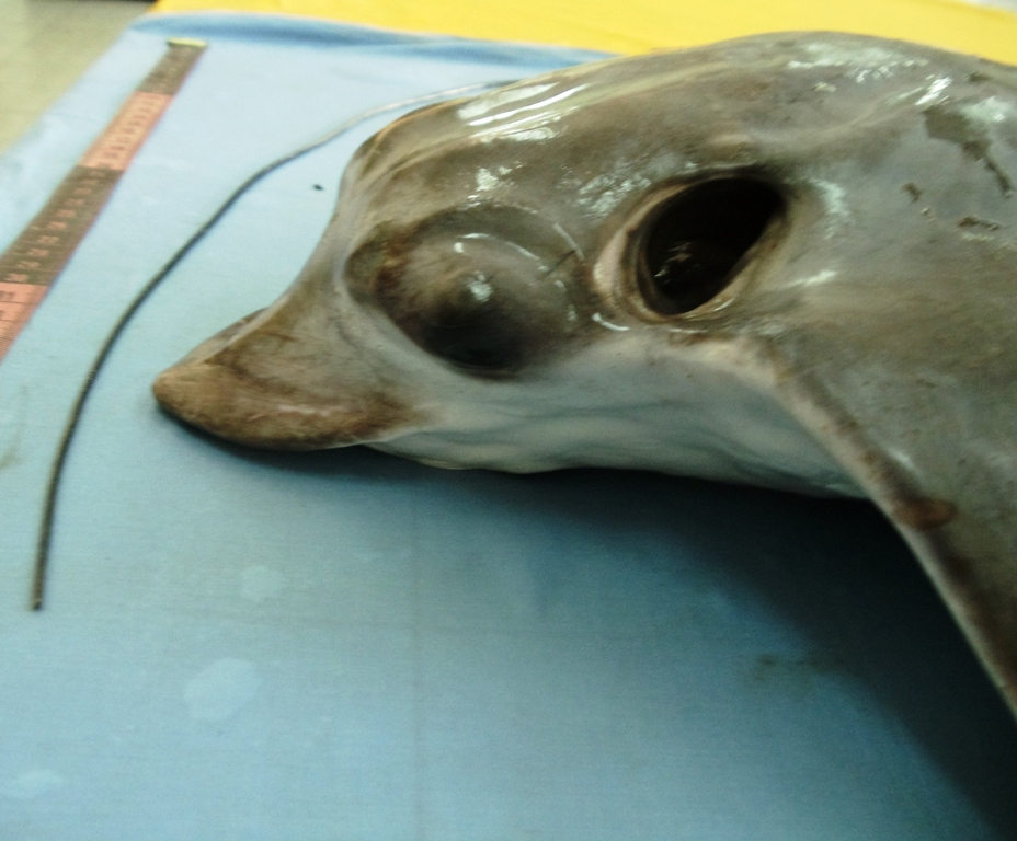 Скат рода пятнистых орляков